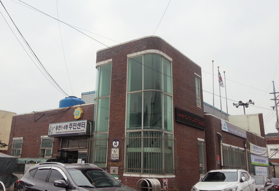 용현1·4동 주민센터